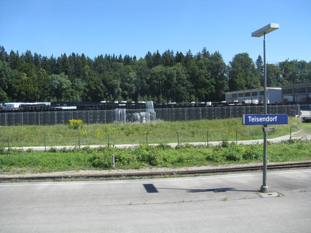 Industrieanlage, Teisendorf Bahnhof